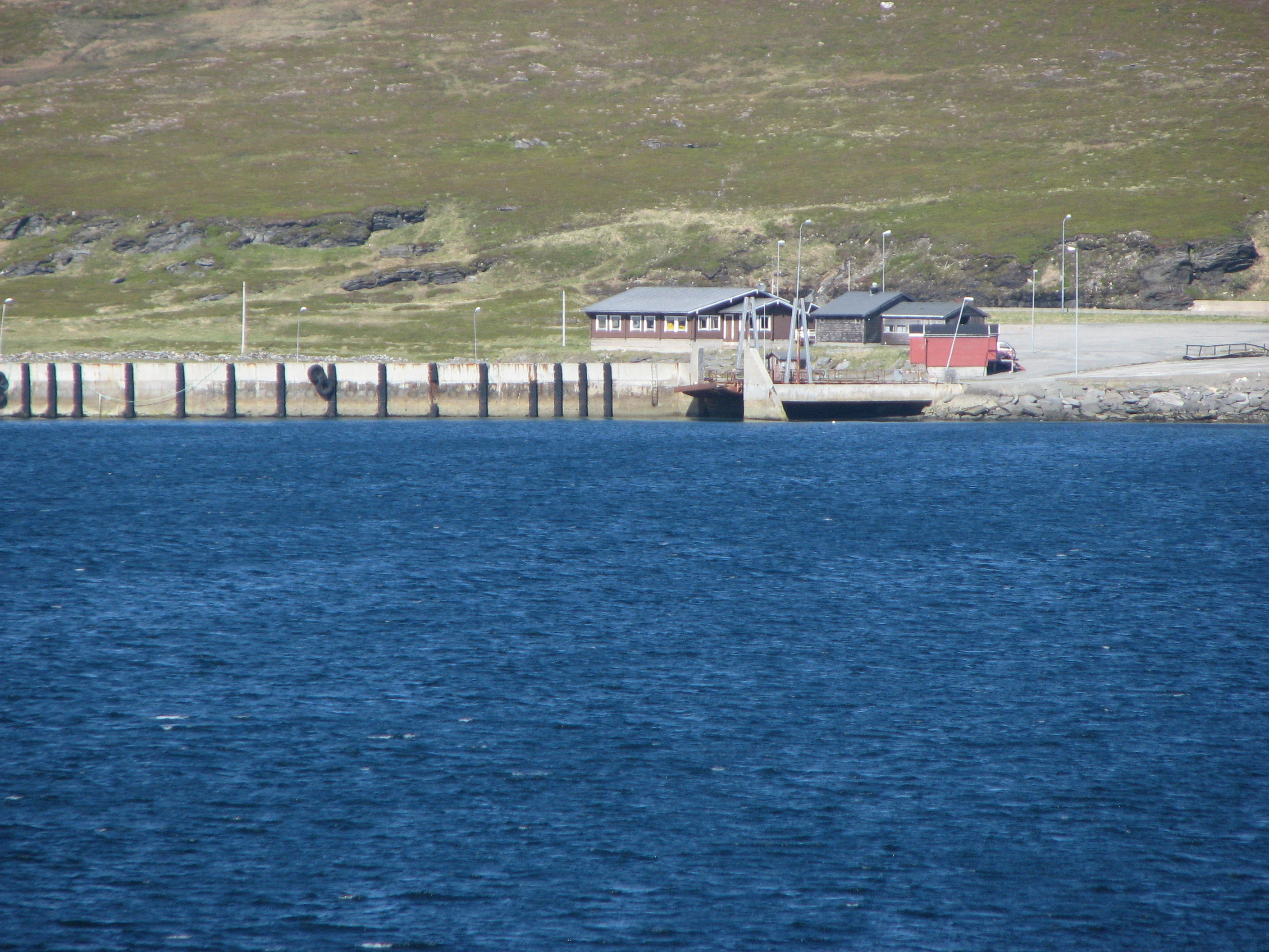 Kåfjord village in Nordkapp, Norway